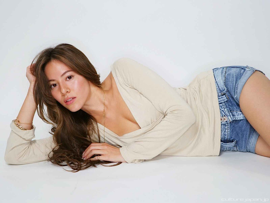 Das japanische Model Jessica Celeste Michibata.